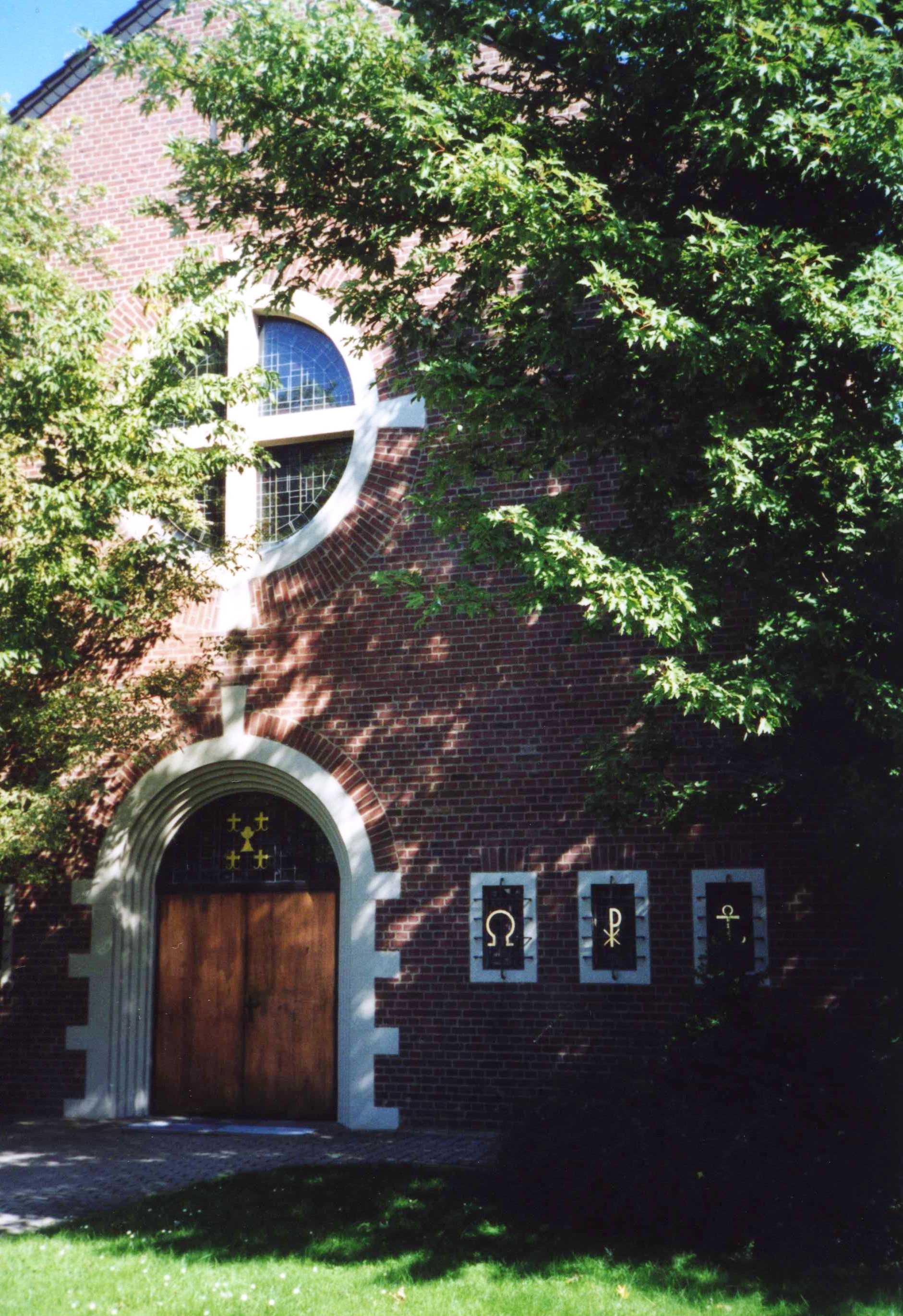 In den 1930er Jahren errichtete kath. Kirche Herz Jesu in Eschweiler-Ost: Eingangsbereich